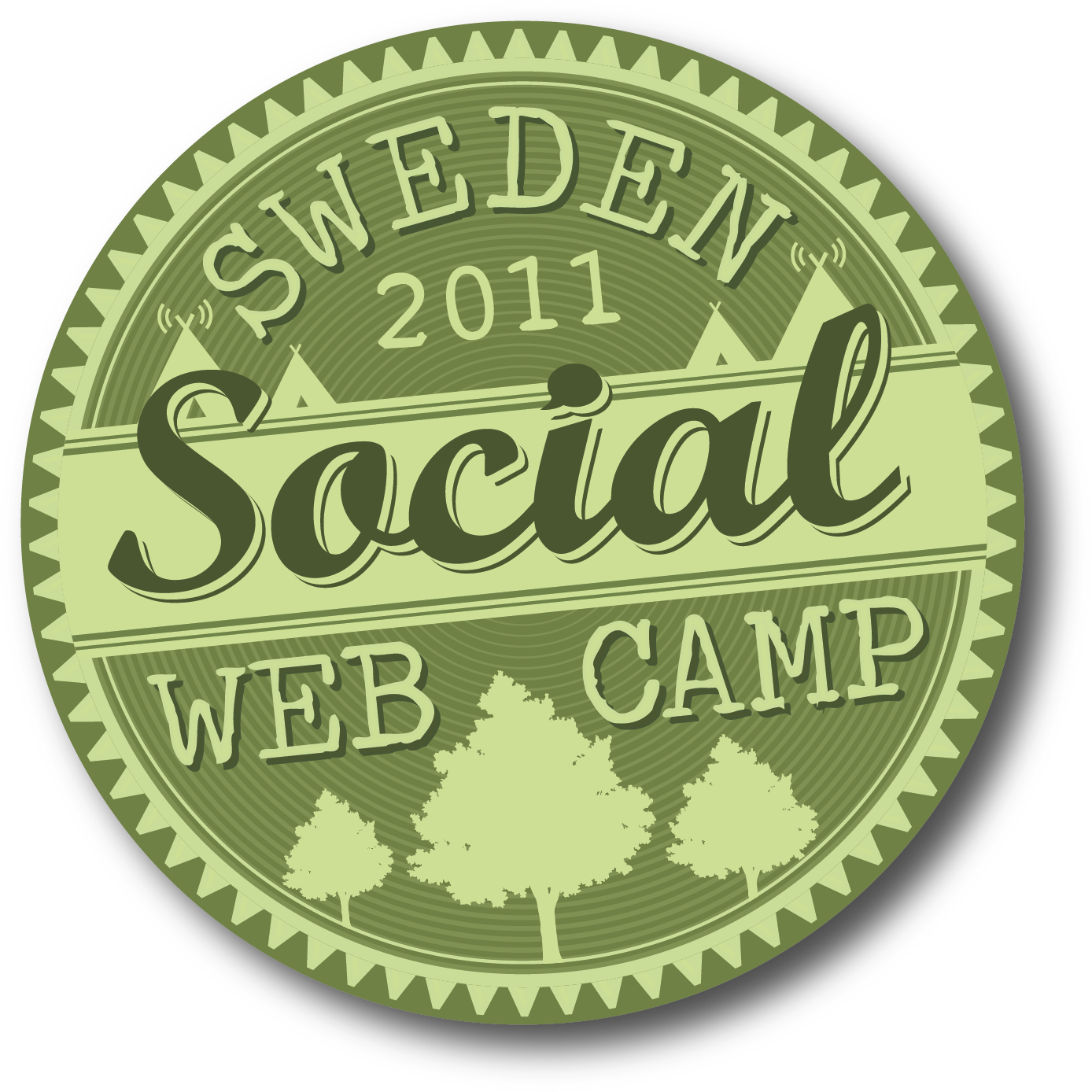 Vinnande bidrag i SSWC:s logotävling 2011. Tält lånande från den andra favoriten i tävlingen - Jonas Gustafsson.